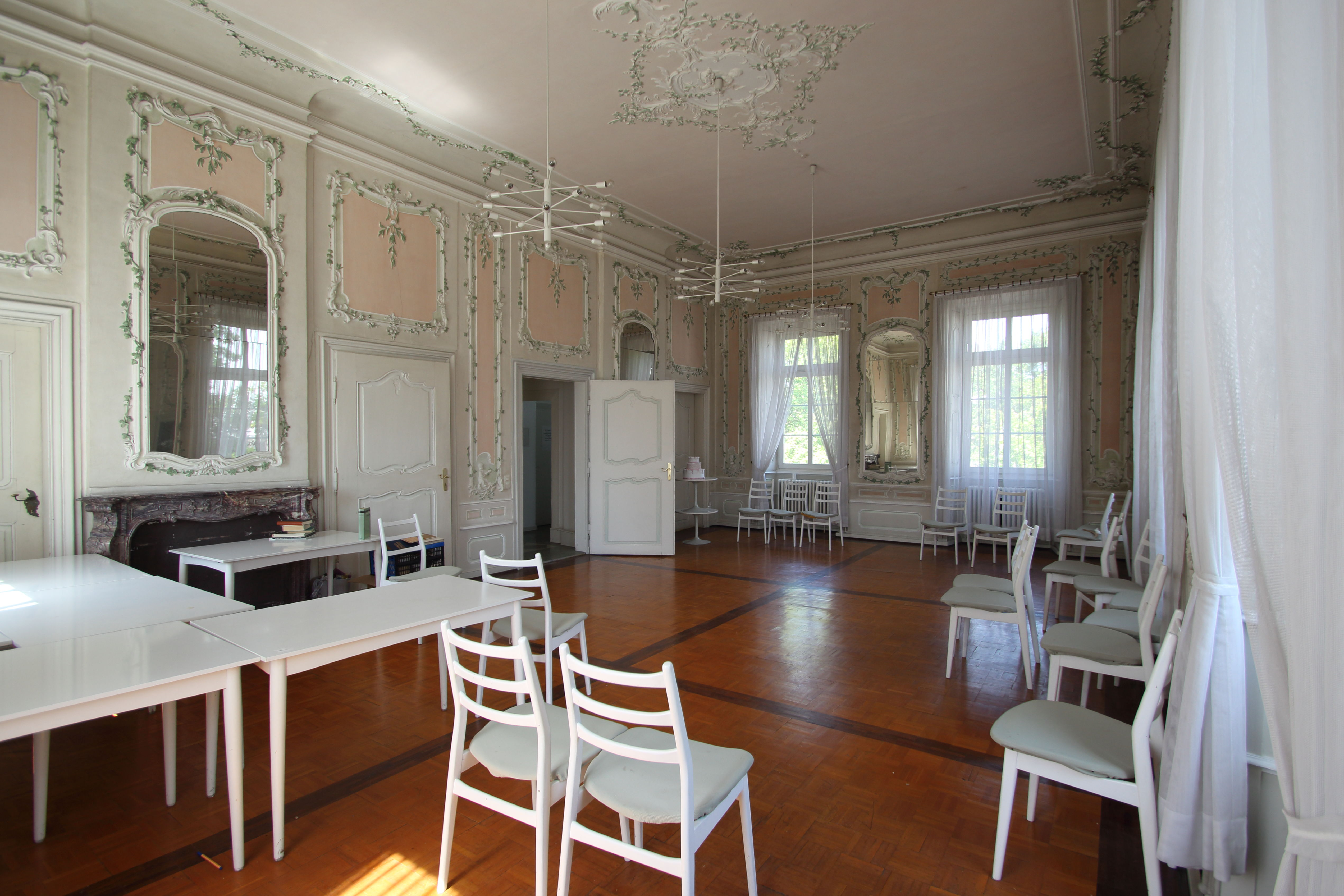 Spiegelsaal des Palais Ostein, Geisenheim am Rhein, Rheingau.